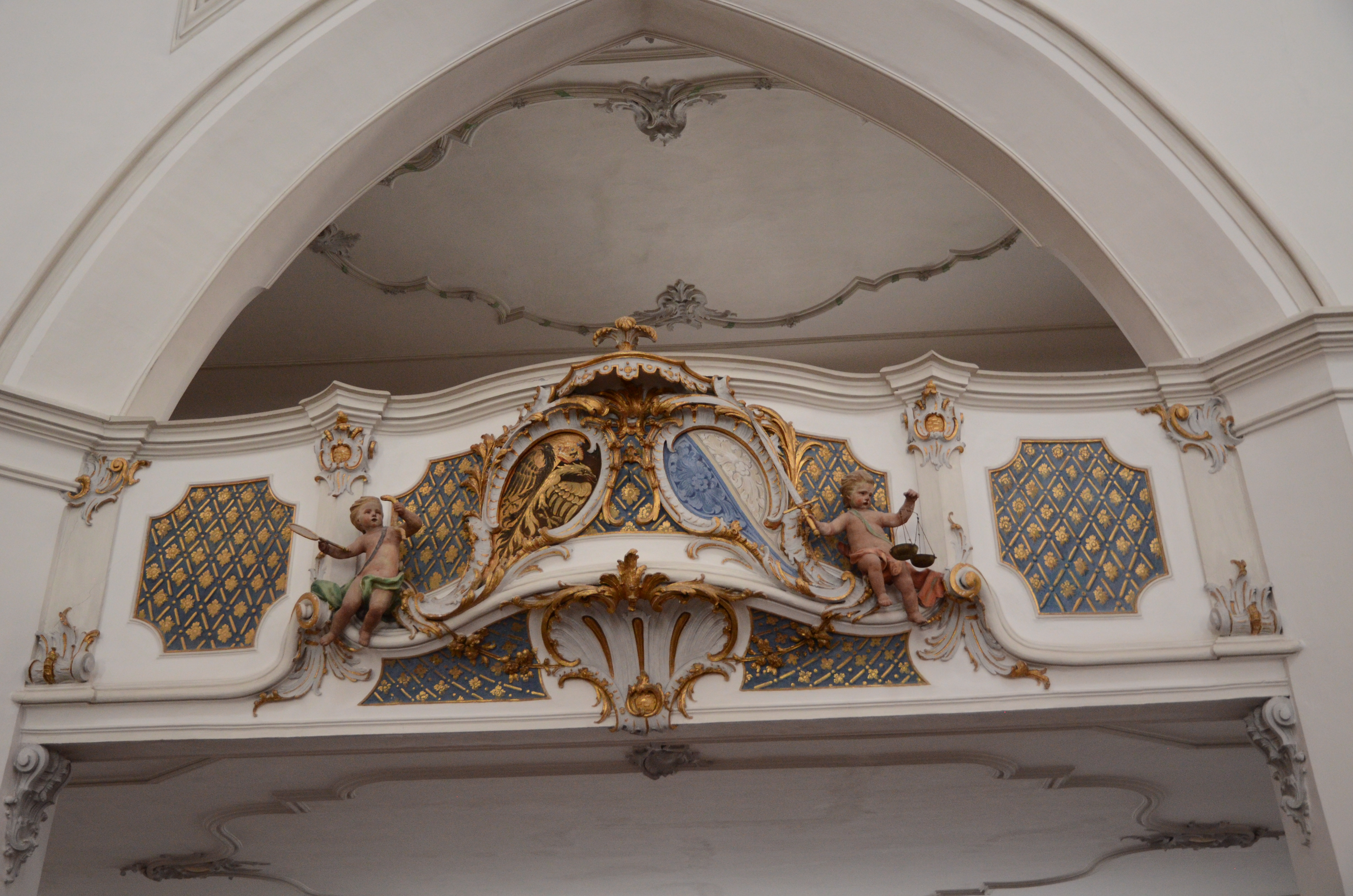 Evang.-Luth. Kirche St. Mang in Kempten